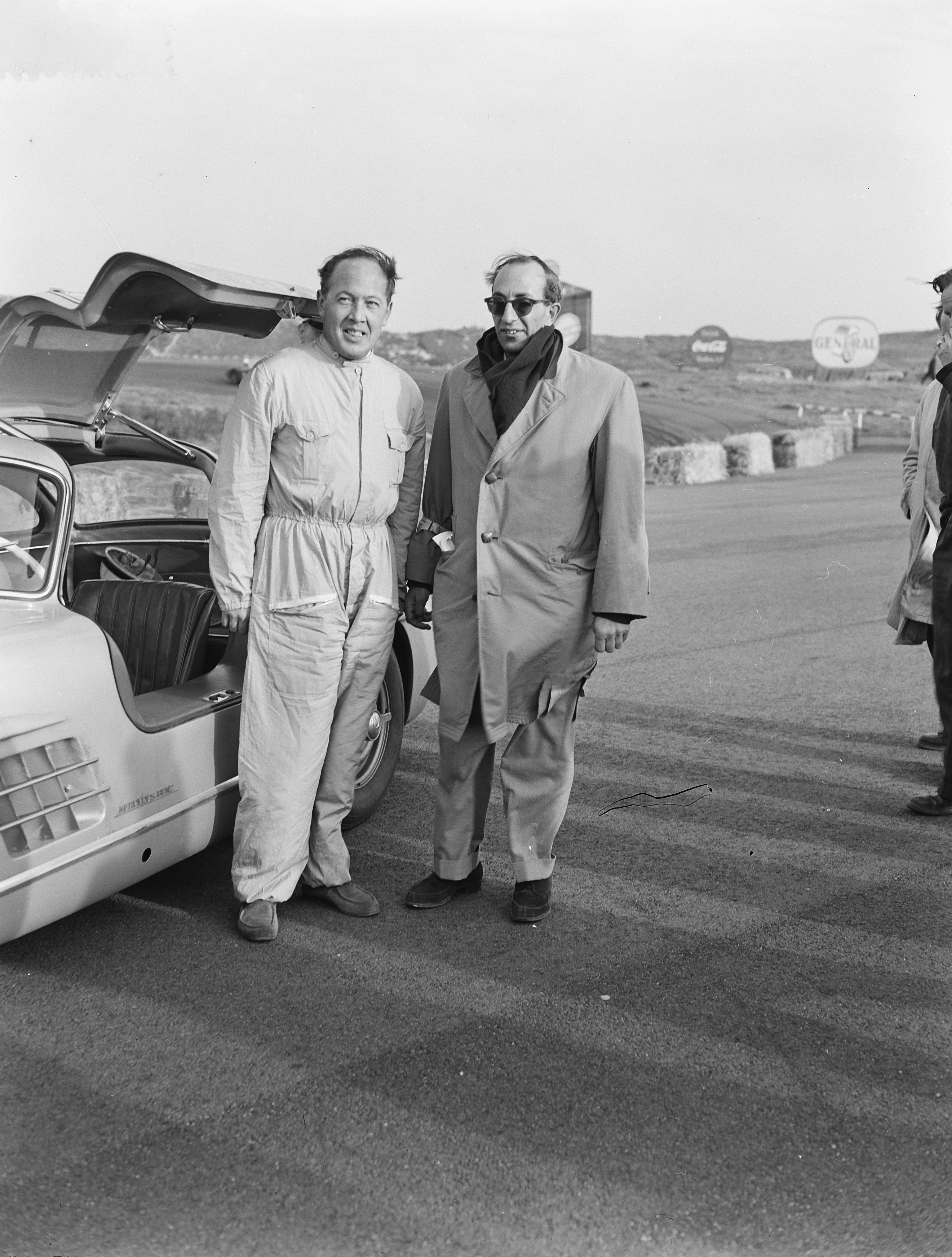 Collectie / Archief : Fotocollectie Anefo Reportage / Serie : [ onbekend ] Beschrijving : Tulpenrallye. Winnaars: Hans Tak en Niemöller met een Mercedes-Benz 300 SL Annotatie : Hans Tak en Niemöller met een Mercedes-Benz 300 SL Datum : 7 mei 1955 Locatie : Noordwijk Trefwoorden : autorally's, autosport, sport Persoonsnaam : Niemöller, W.C., Tak, Hans Instellingsnaam : Tulpenrally Fotograaf : Pot, Harry / Anefo Auteursrechthebbende : Nationaal Archief Materiaalsoort : Negatief (zwart/wit) Nummer archiefinventaris : bekijk toegang 2.24.01.04 Bestanddeelnummer : 907-1226